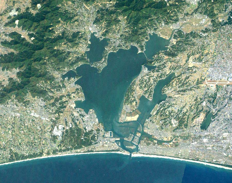 浜名湖のランドサット画像。画面右から順に庄内湖、細江湖、猪鼻湖、松見ヶ浦の枝湾があるのがわかる。下に広がる海は遠州灘。